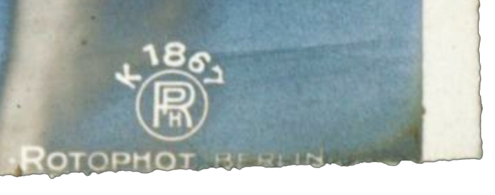 „RPH“ Markenzeichen der Rotophot AG Berlin